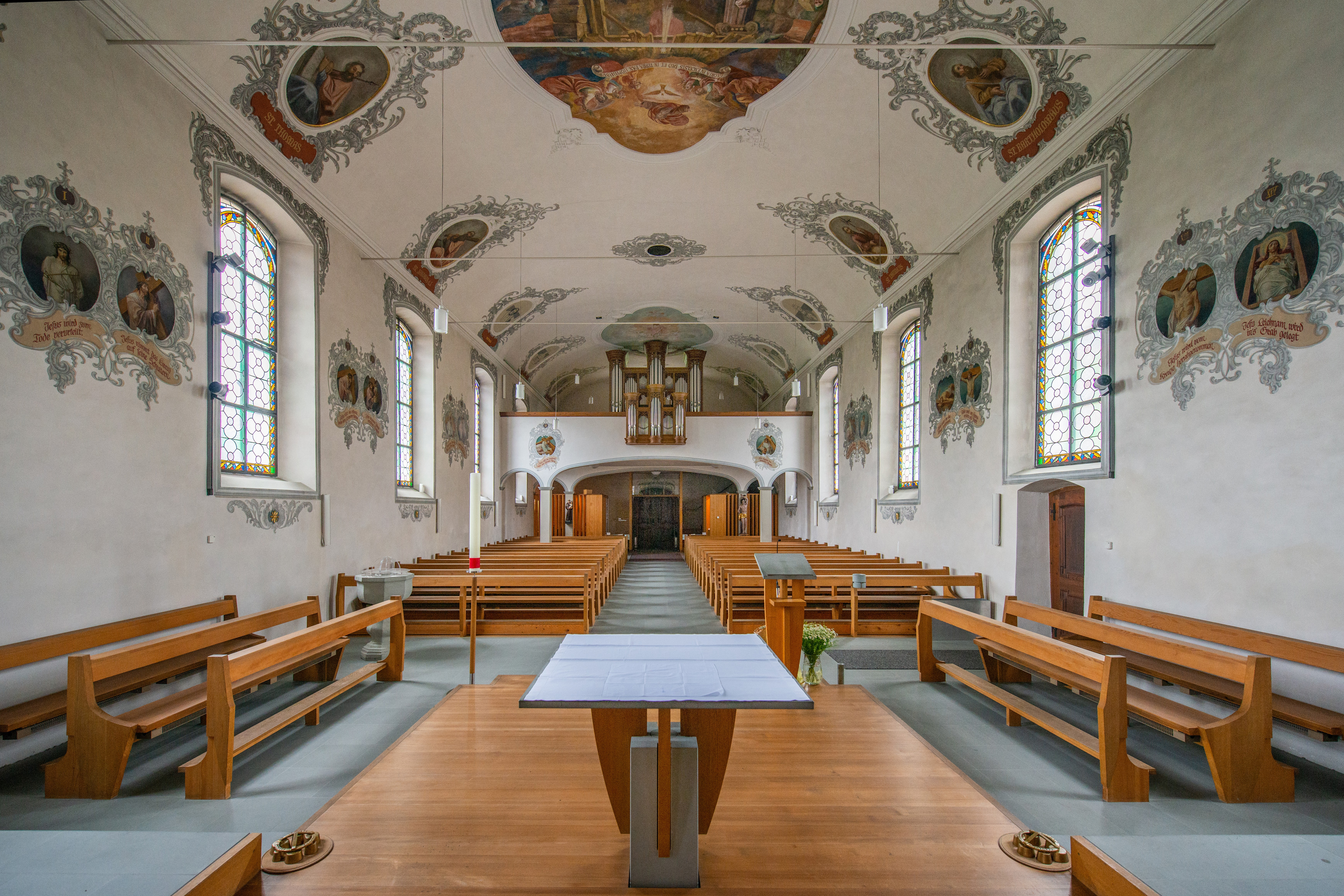 Pfarrkirche "Hl. Batholomäus" in Mäder.